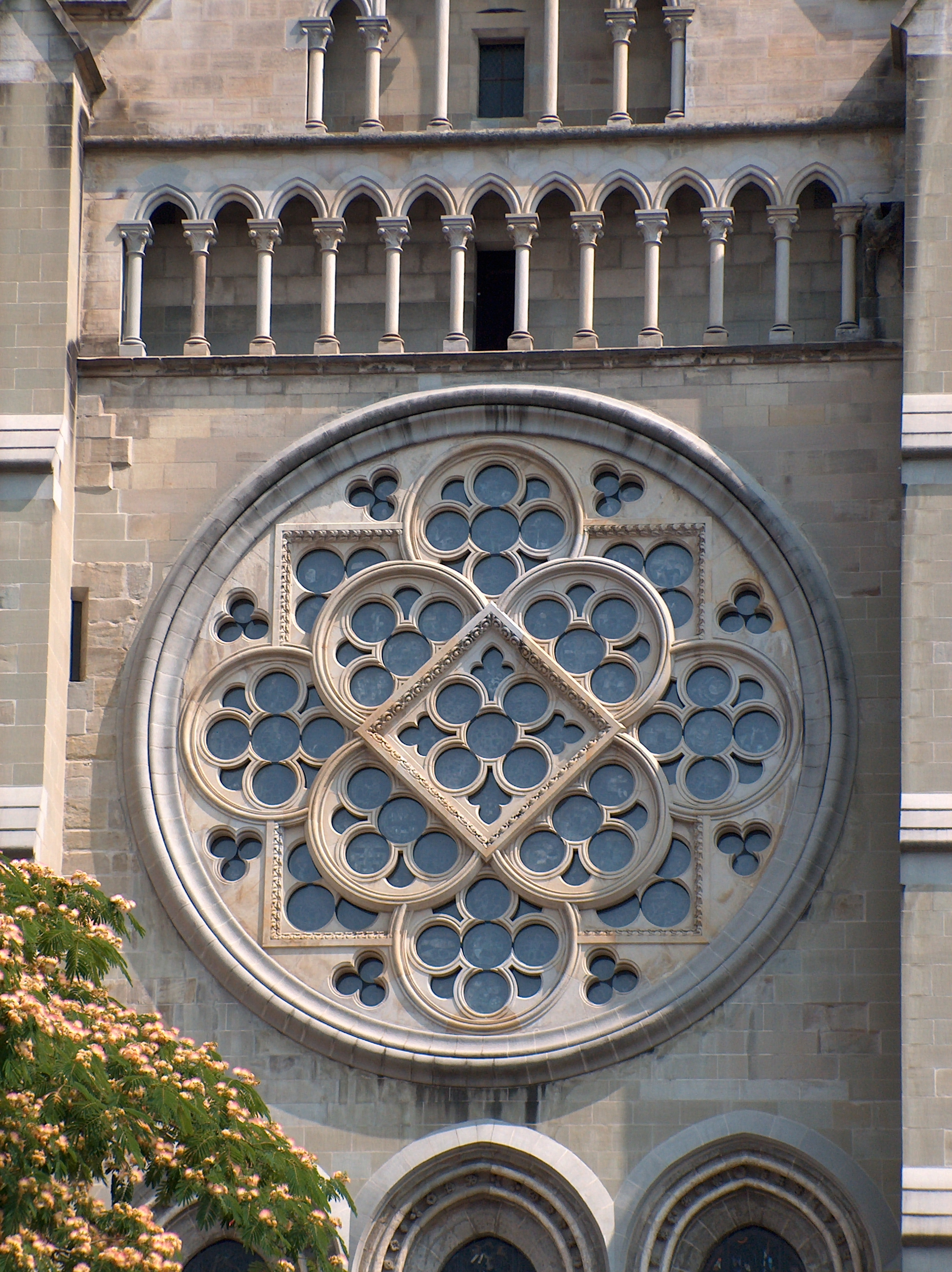 Rosace de la Cathédrale de Lausanne Vue d'en haut de la rue de la mercerie